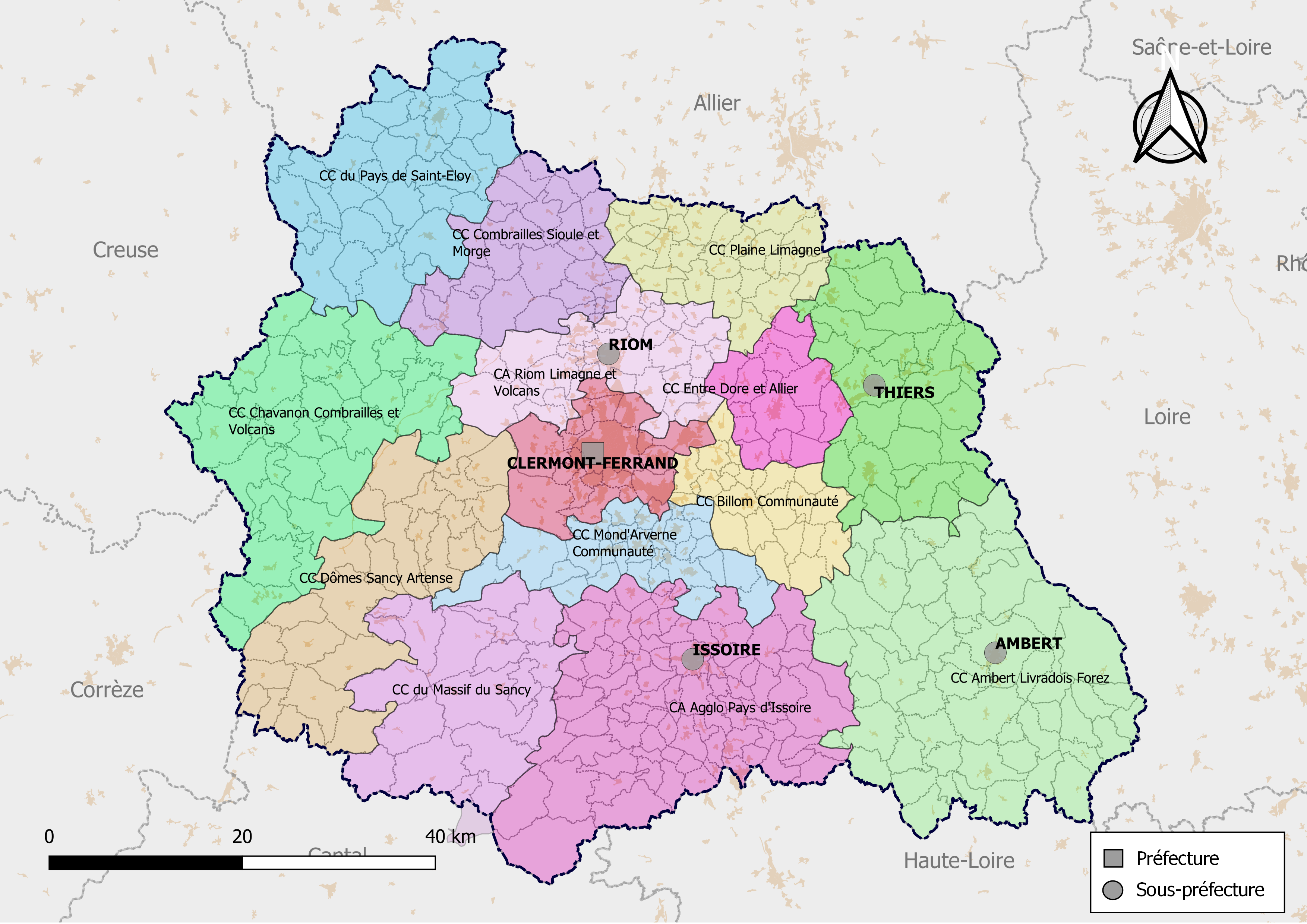 Carte des intercommunalités du département du Puy-de-Dôme, France. Composition au 1er janvier 2019.